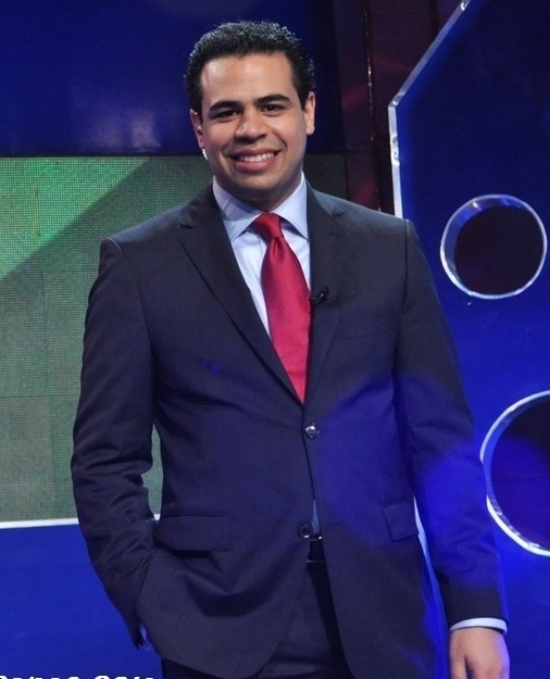 Presentador de televisión dominicano Roberto Angel Salcedo.